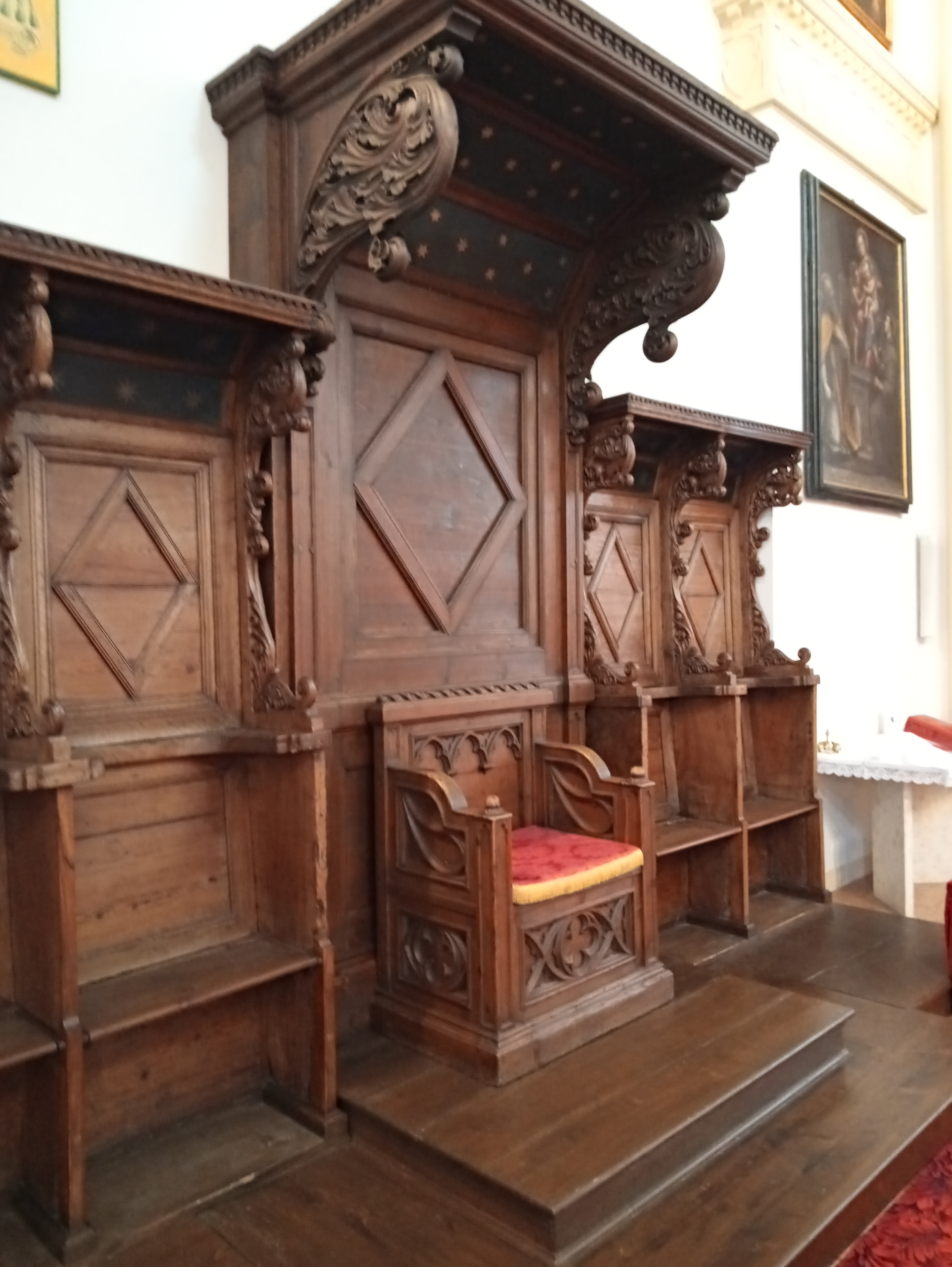 Copia del XIX secolo